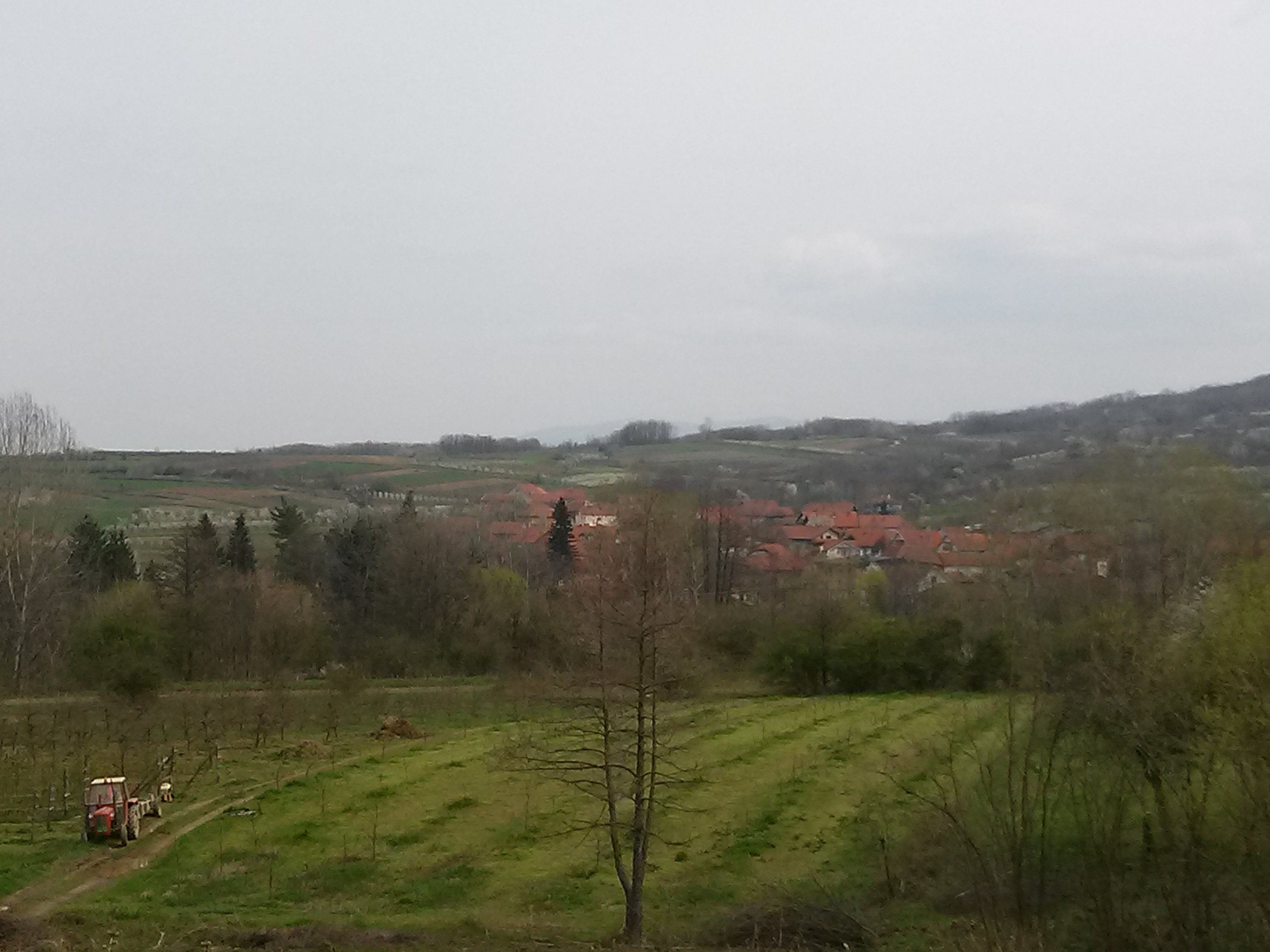 Srpski (latinica): Panorama Čukljenika sa pogledom na obradive površine atara sela